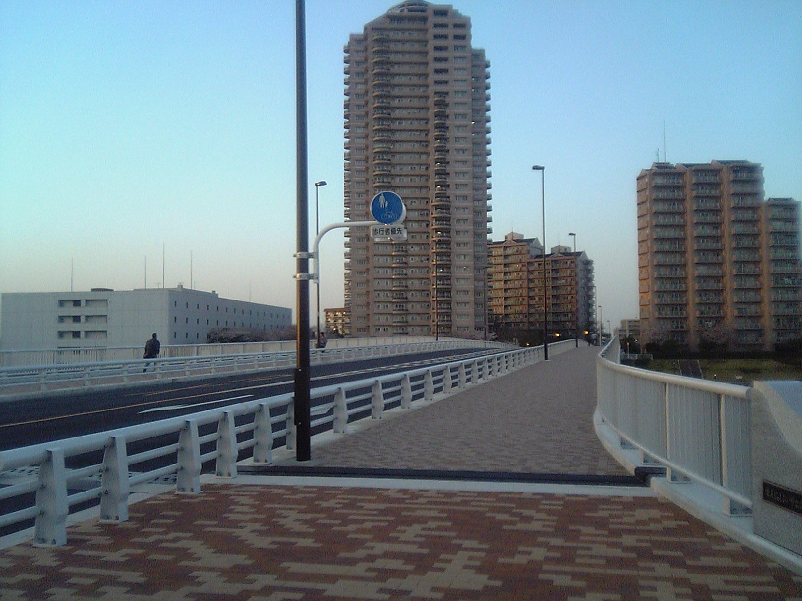 A photo of Senju-Shioiri Bridge,taken at Minami-Senju,Arakawa-ward,Tokyo.